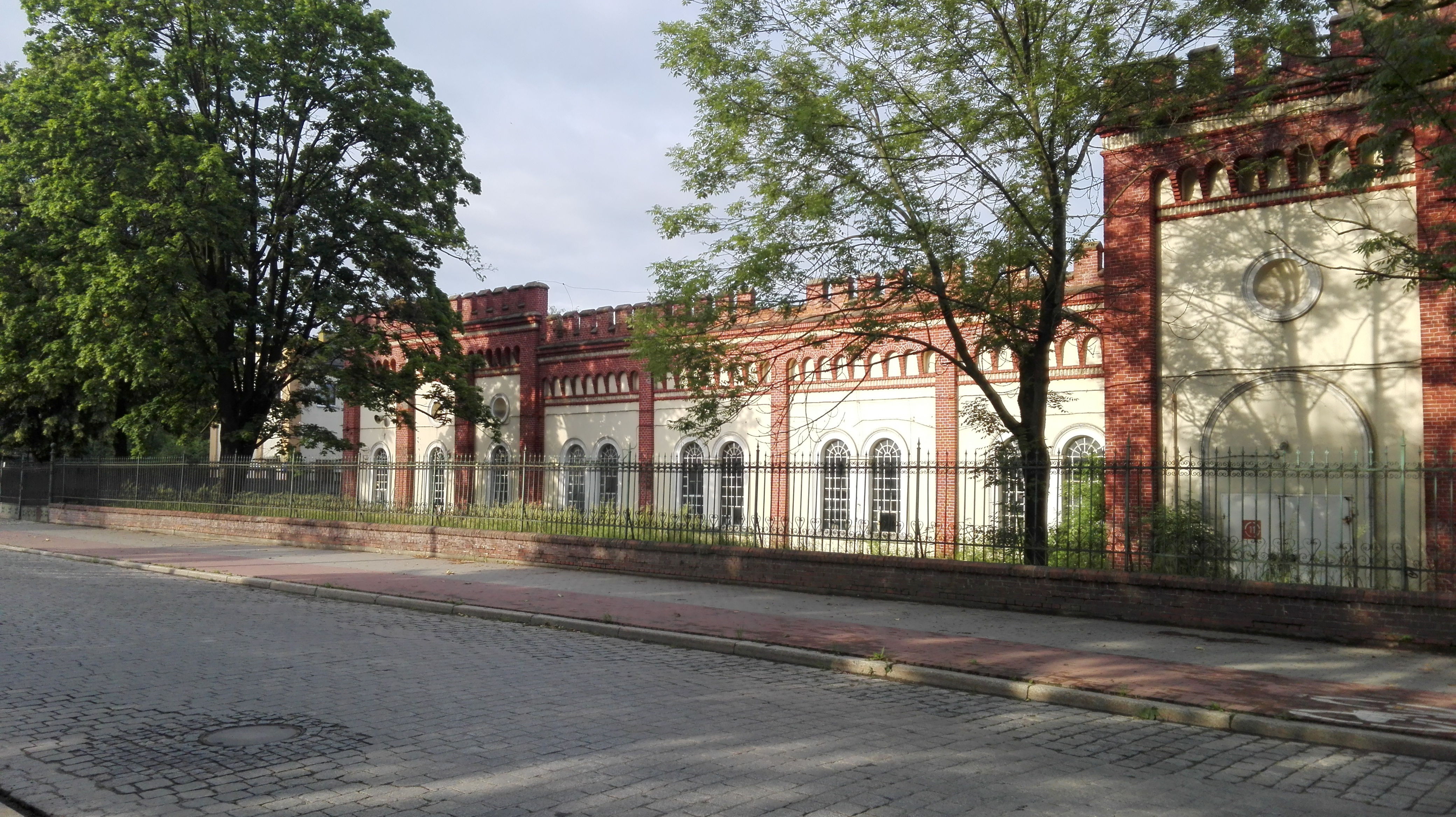 Prudnik - byłe Zakłady Przemysłu Bawełnianego „Frotex“ S.A.